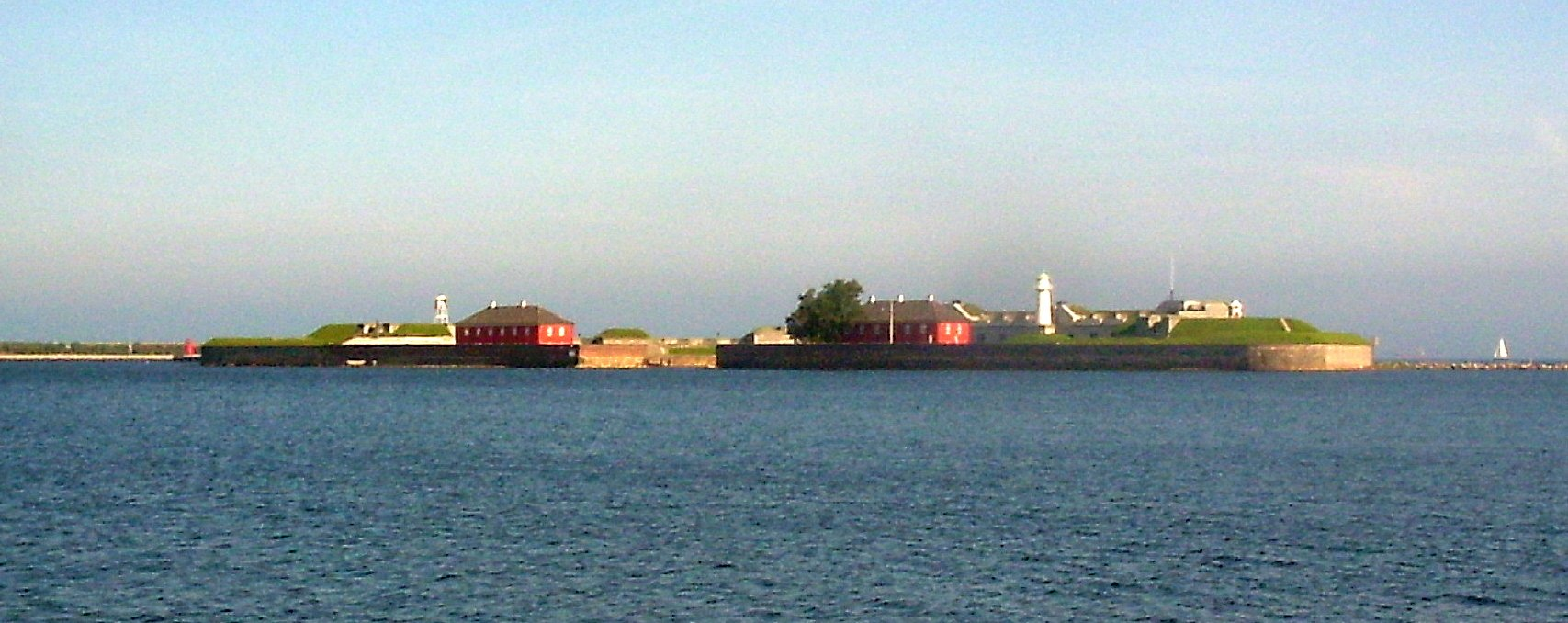 Das Seefort Trekroner 2005